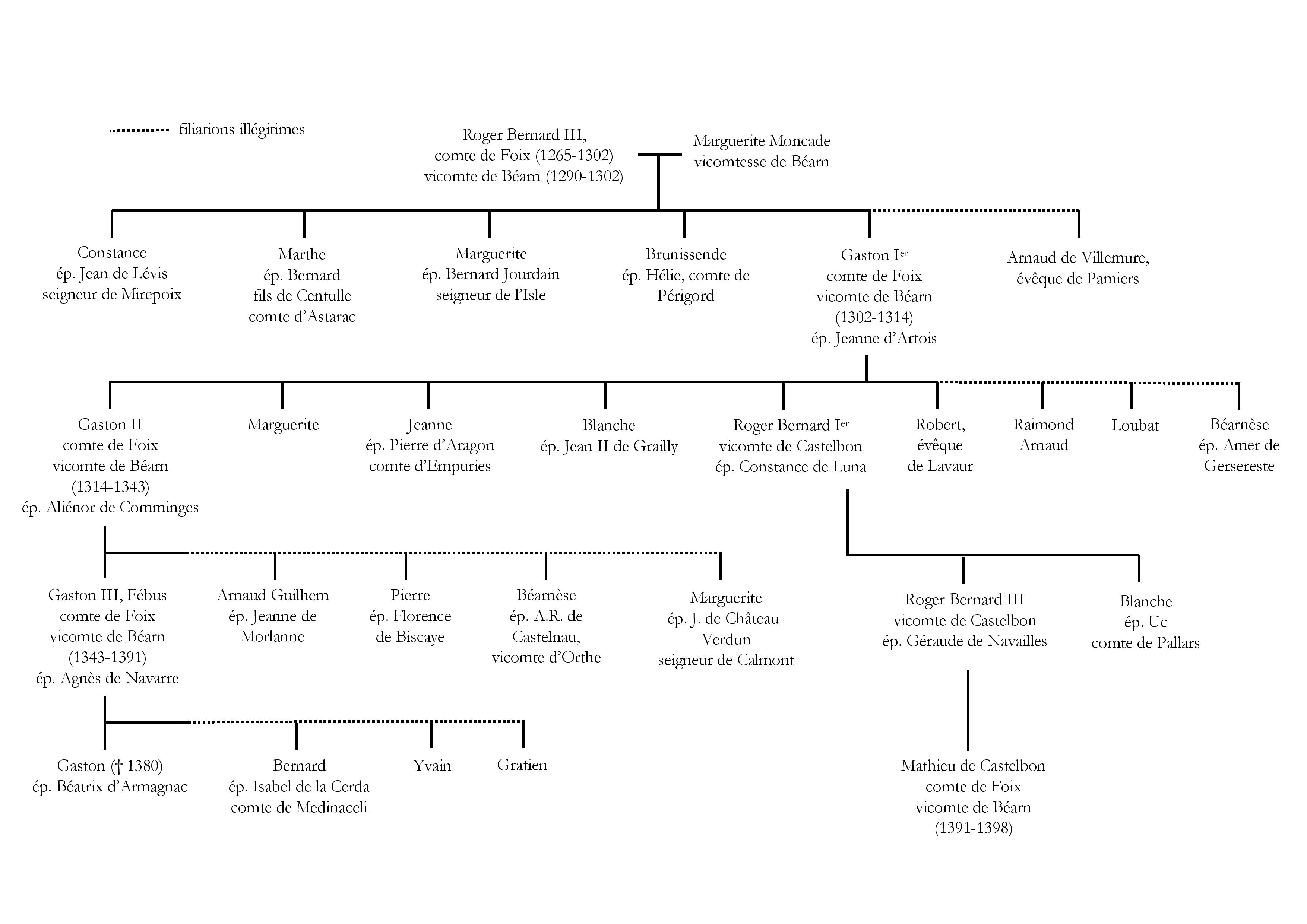 Arbre généalogique de Gaston III de Foix-Béarn, dit Fébus. D'après Pierre Tucoo-Chala, Gaston Fébus : prince des Pyrénées, Editions Deucalion, 1991.